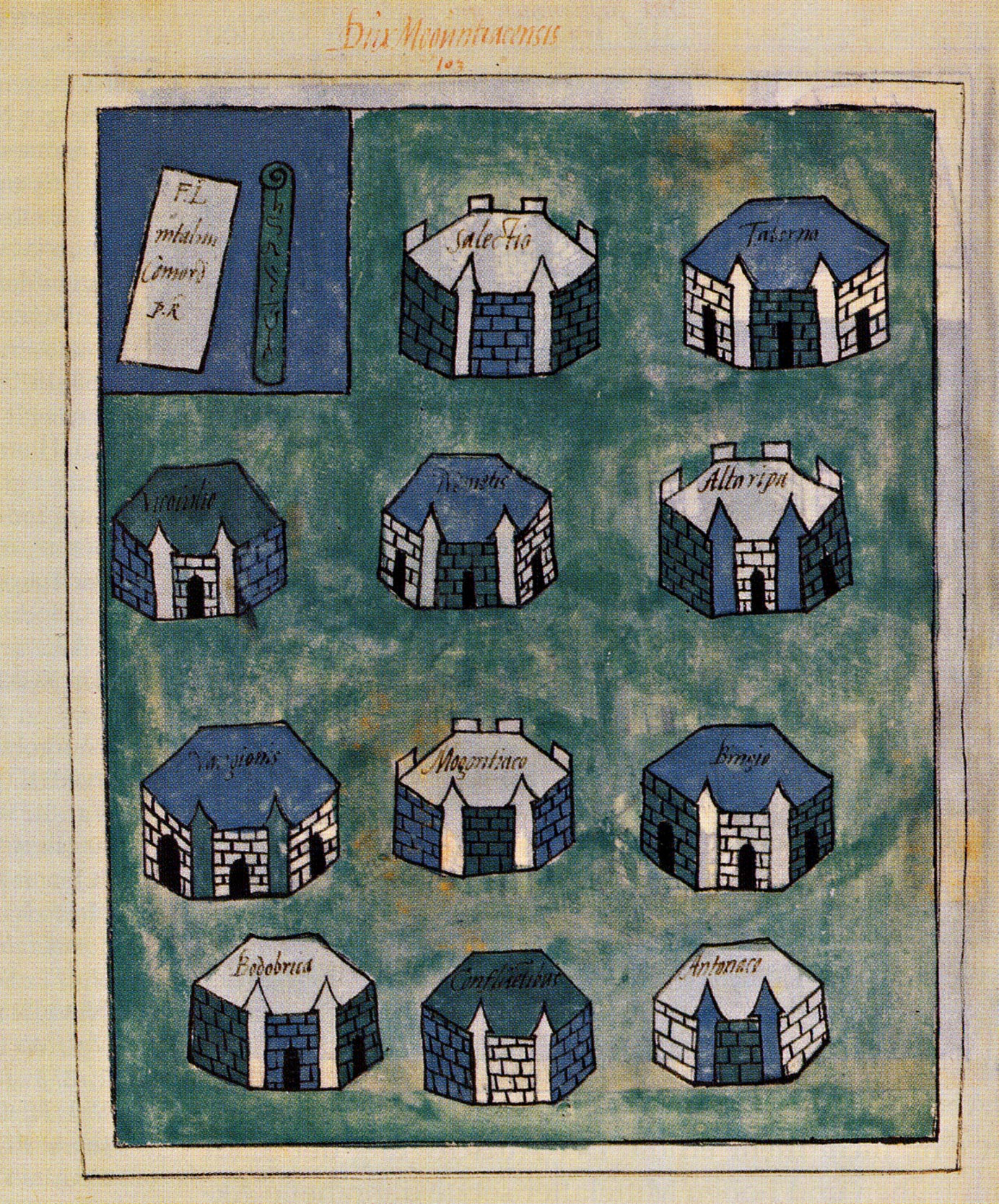 Römische Städte im Befehlsbereich des Dux Mogontiacensis in der Notitia Dignitatum (Bayerische Staatsbibliothek München, Cod. Lat. 10291, fol. 220v). Abbildung aus dem 1550/51 in Speyer entstandenen zweiten Miniaturensatz in der für Ottheinrich hergestellten Sammelhandschrift mit der Notitia dignitatum) In der 2. Reihe von unten befindet sich in der Mitte Mogontiaco, weiterhin werden beispielsweise Salectio (Seltz), Taberna (Tabernae rhenanae, Rheinzabern), Altaripa (Altrip), Bingio (Bingium, Bingen), Vangionis (Civitas Vangionum, Worms), Confluentes (Koblenz) und Bodobrica (Boppard) aufgezählt